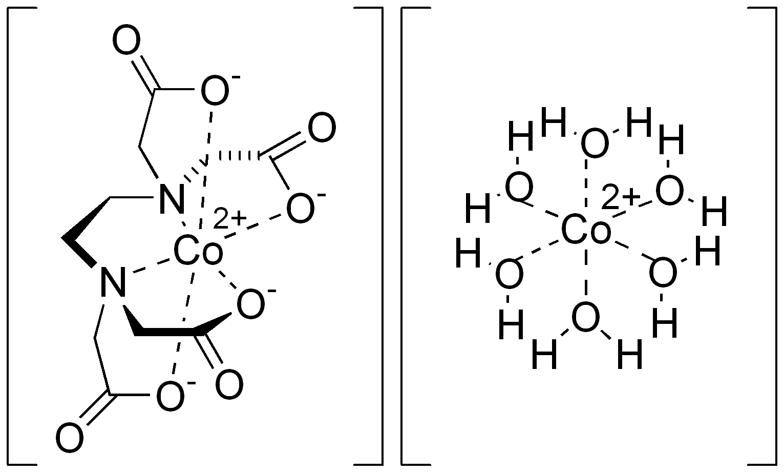 chemical structure of dicobalt edetate ( EDTA cobalt (II) salt )